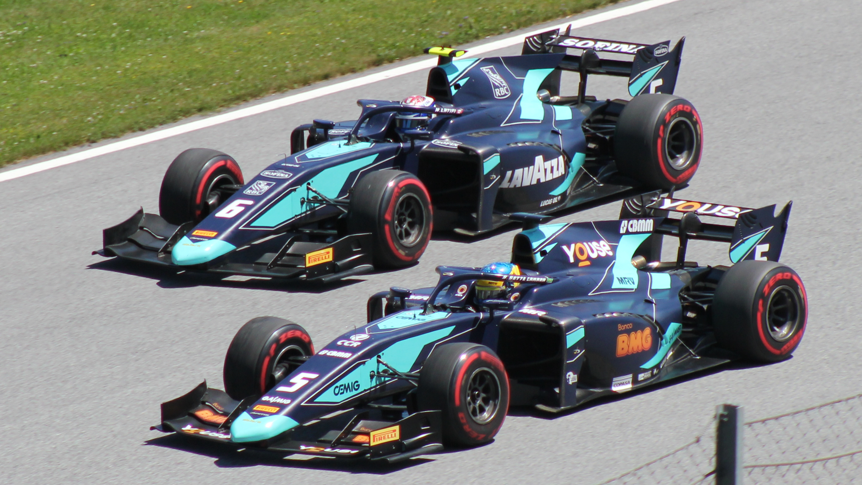 Beide DAMS beim Rennwochenende in Österreich 2019